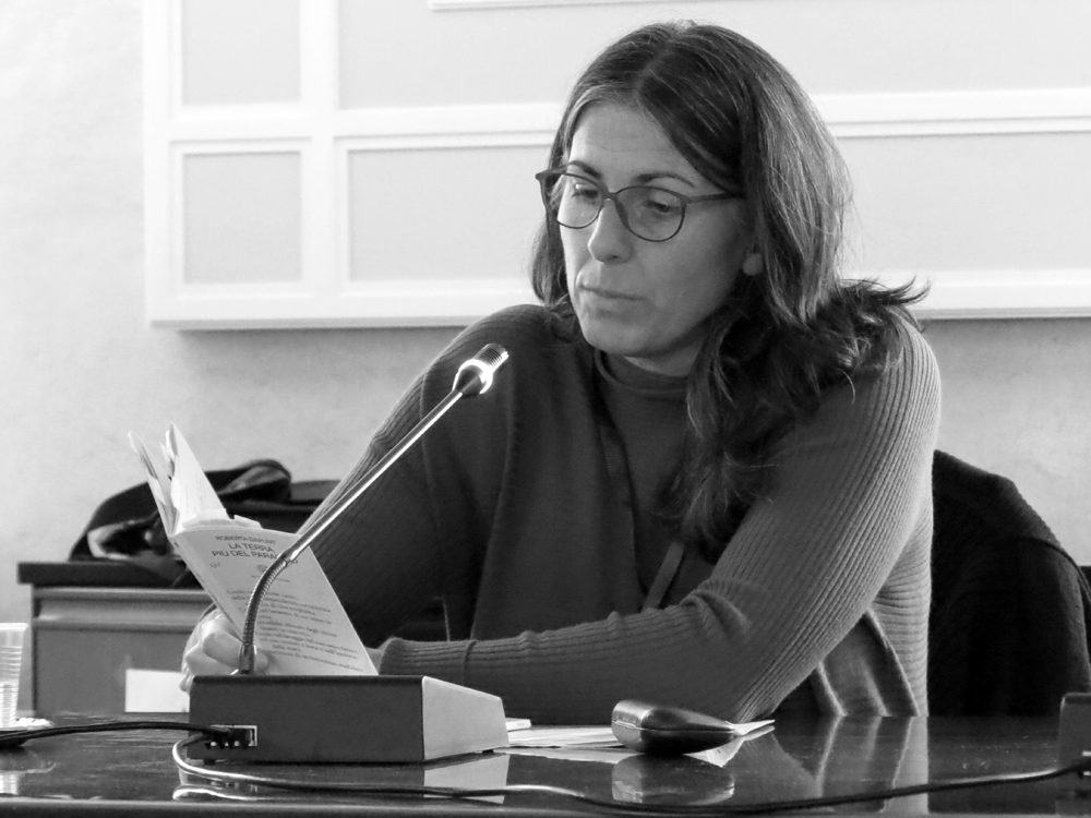 Roberta Dapunt